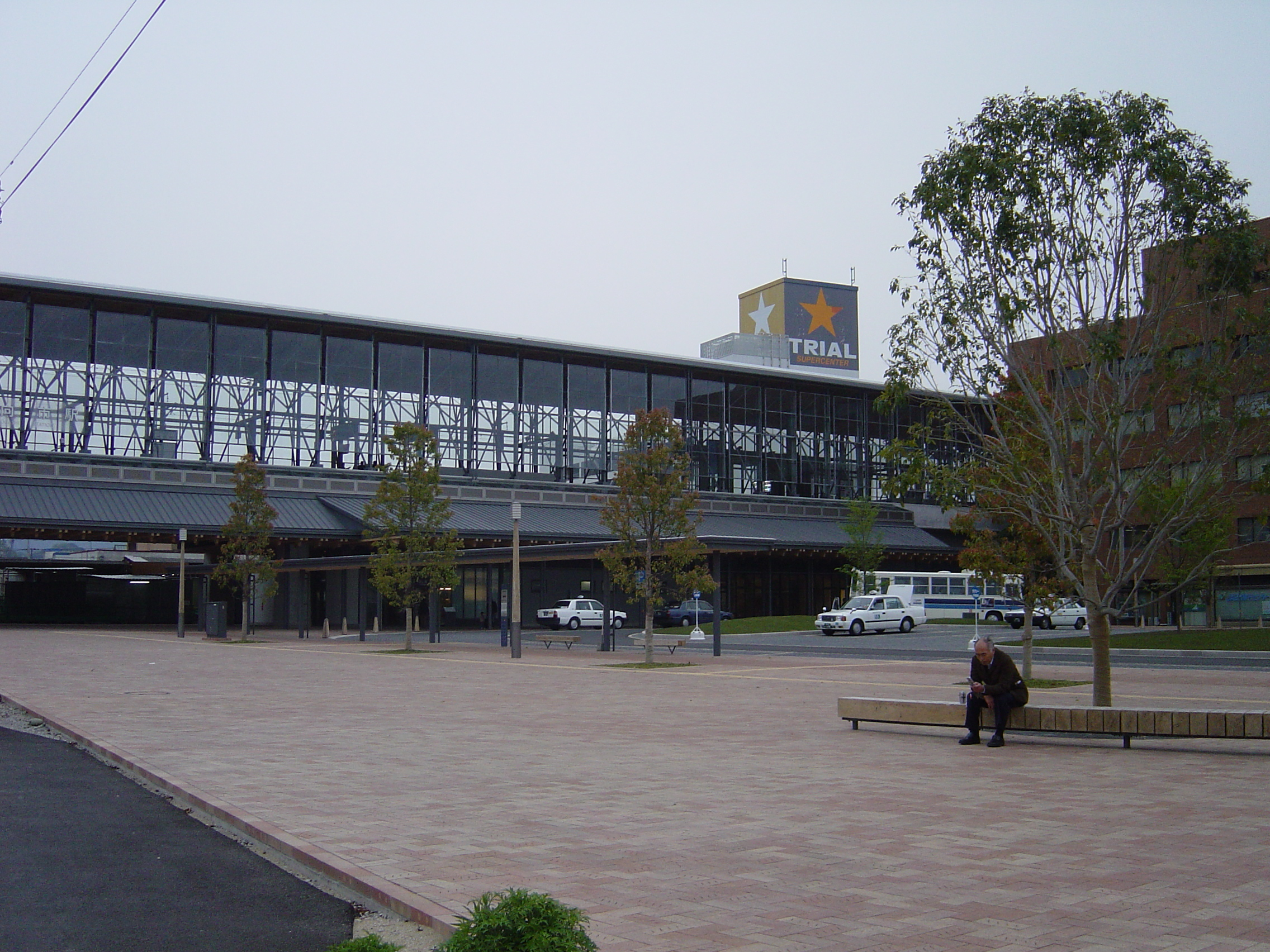 日向市駅駅舎(Japan-Miyazaki-Hyugashi sta.)